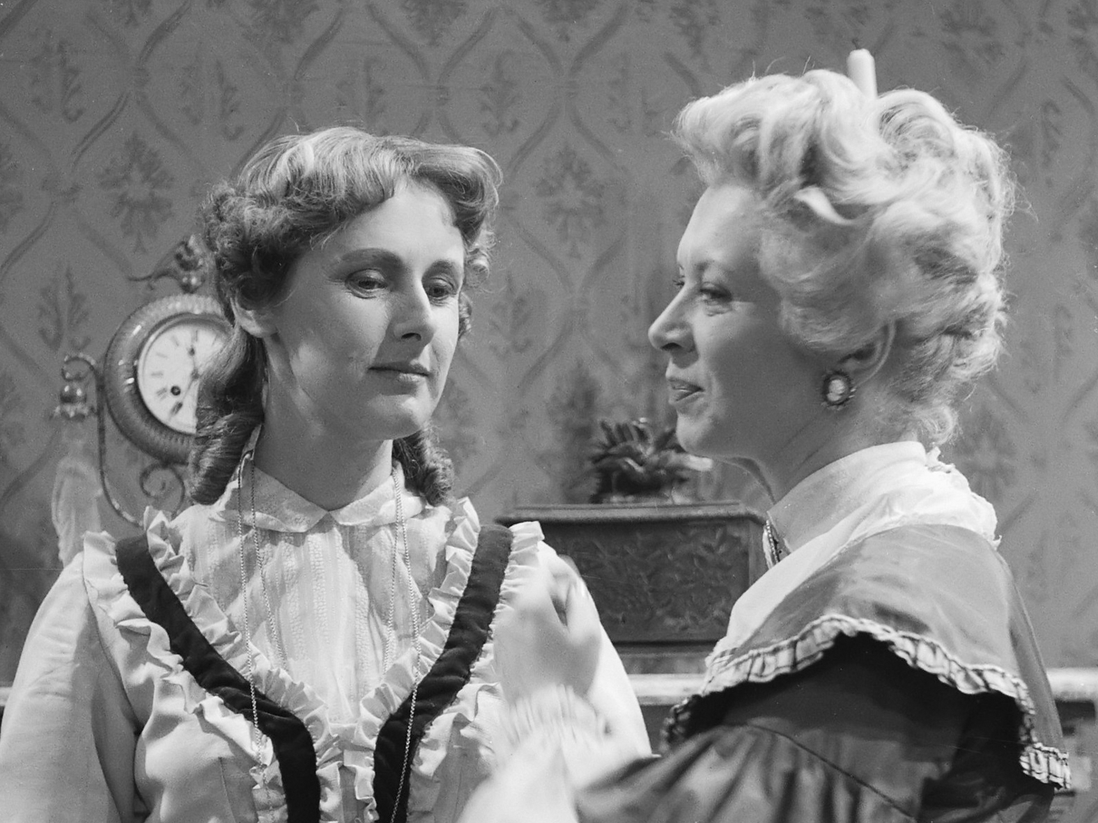 Televisiespel "De erfgename", links Manon Alving, rechts Fientje Berghegge *16 december 1959